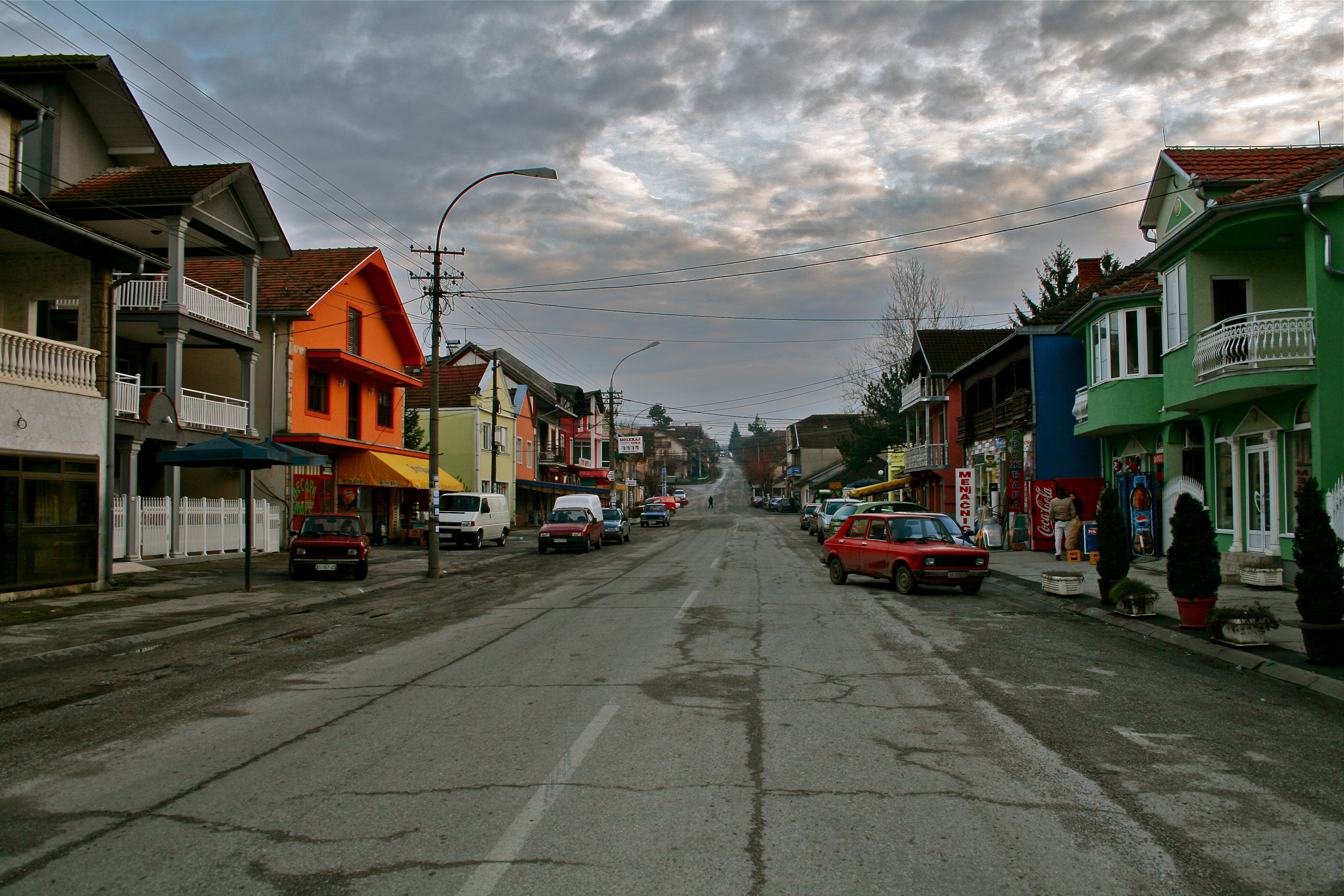 Велики Поповић